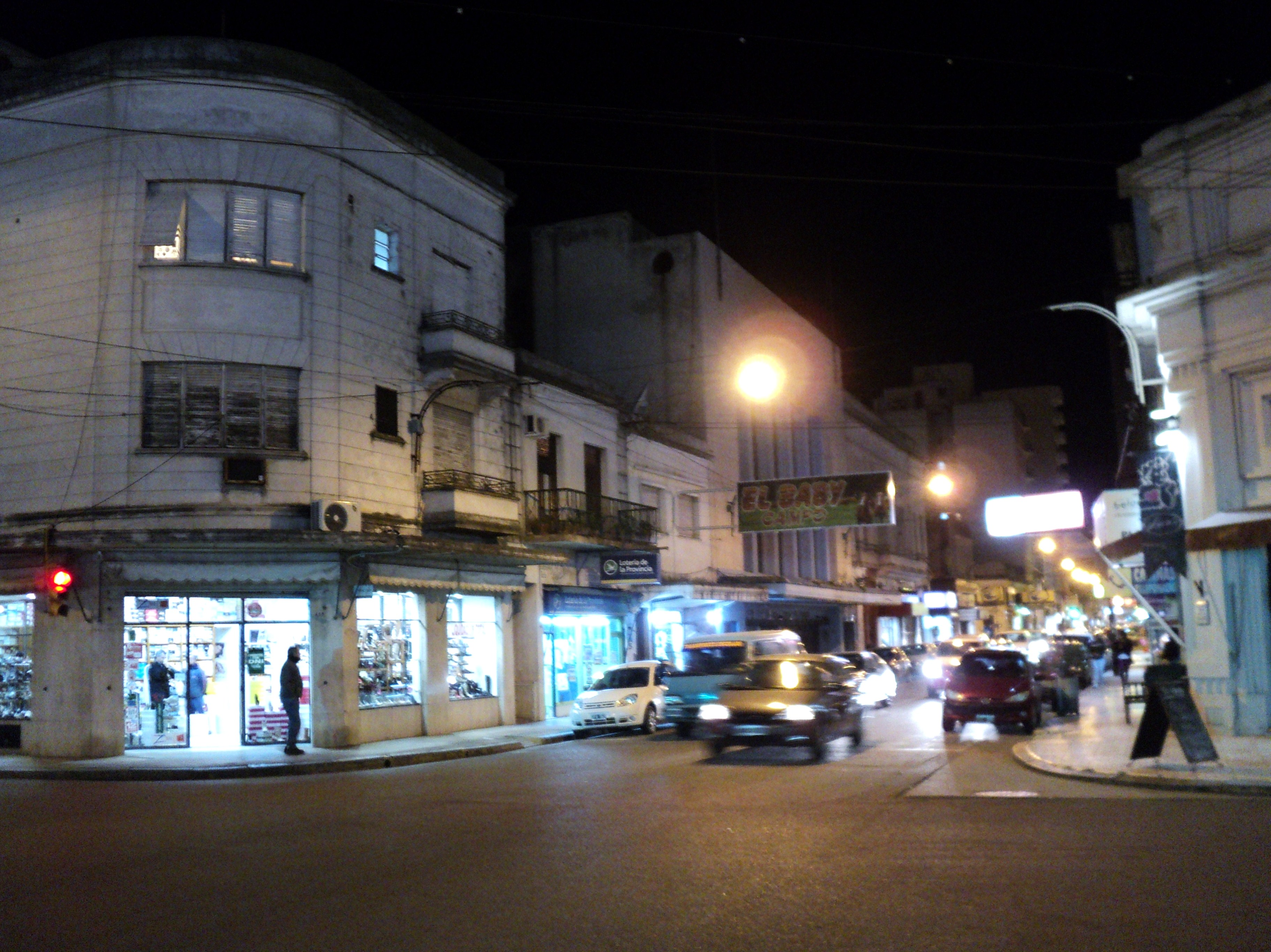 parte del microcentro de azul